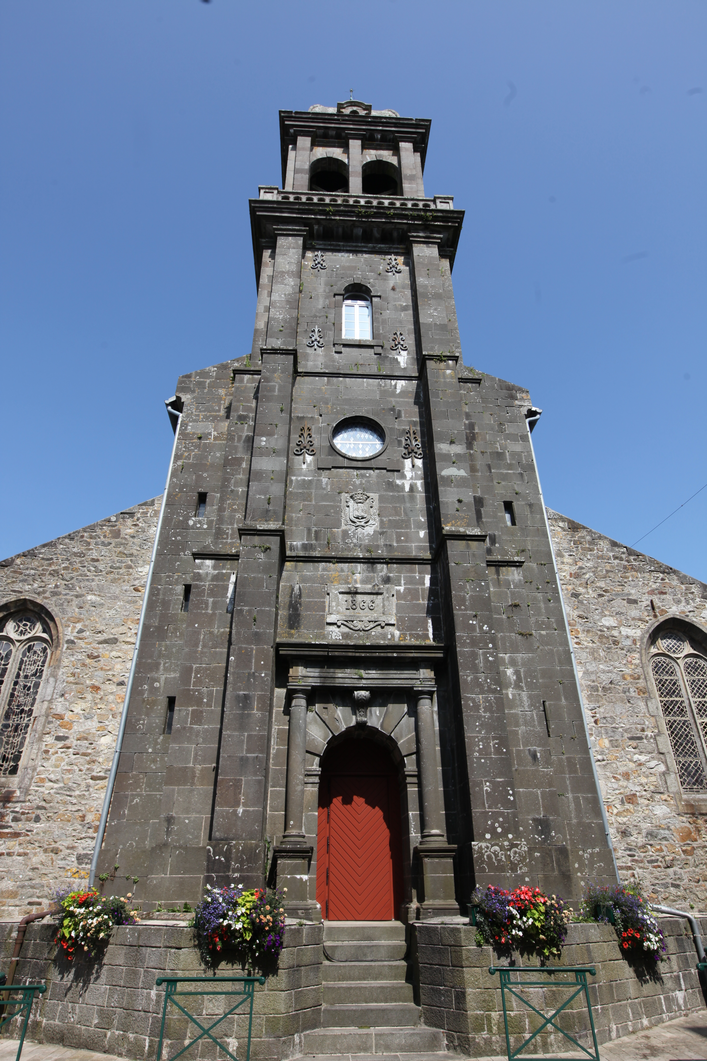 Clocher de l'église Saint-Pierre de Crozon